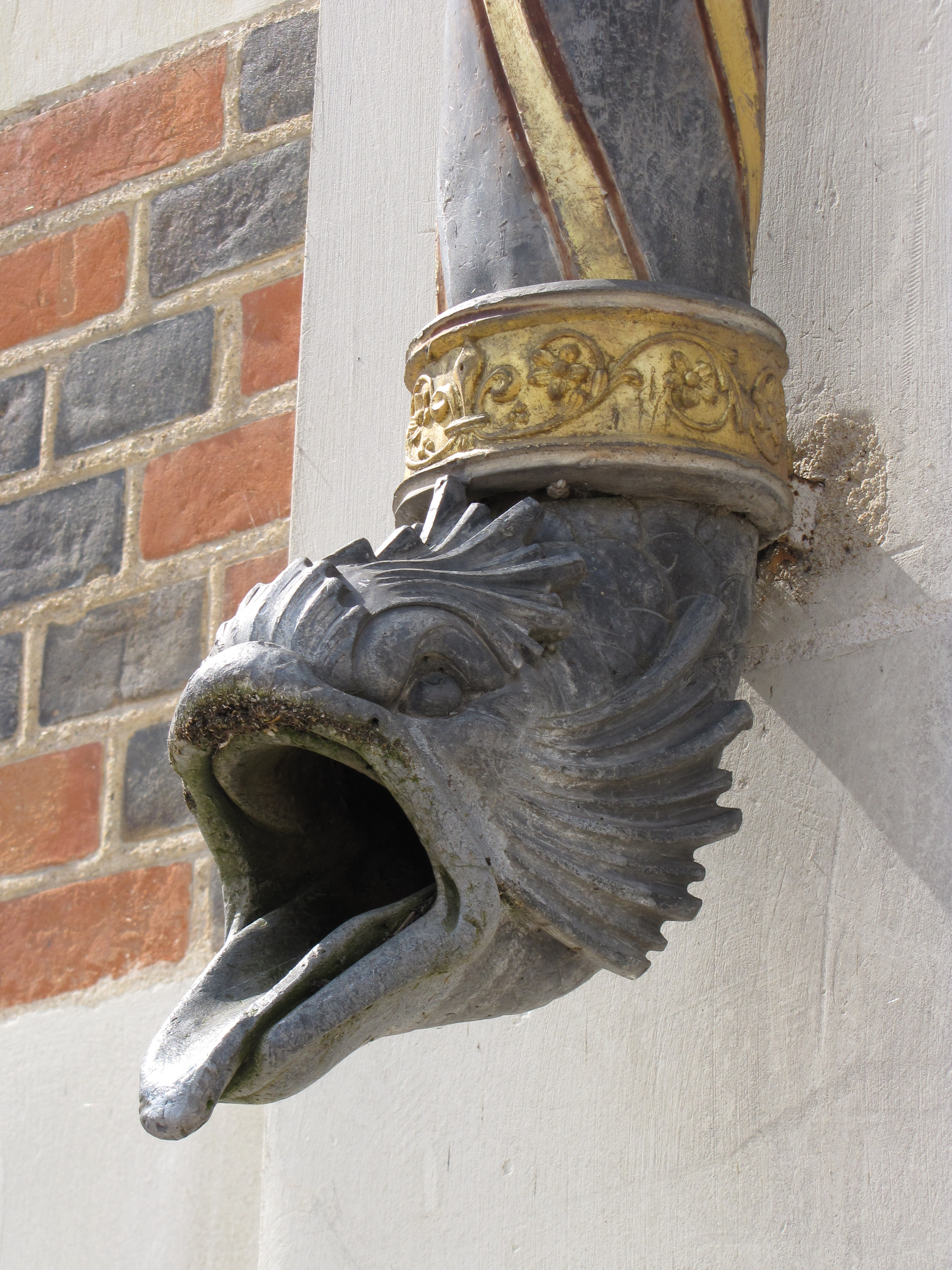 Schloss Blois, Wasserspeier an der Fassade des Flügels Ludwigs XII.